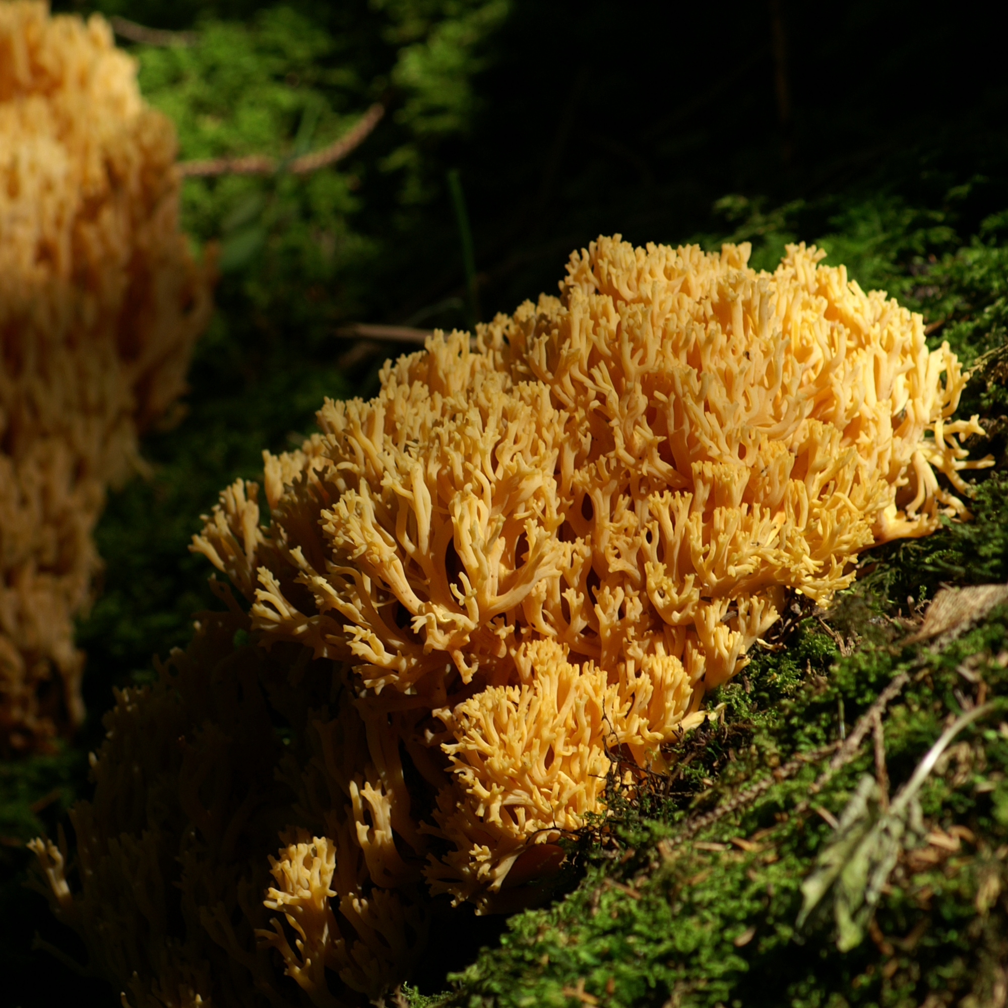 Goldgelbe Koralle (Ramaria aurea)